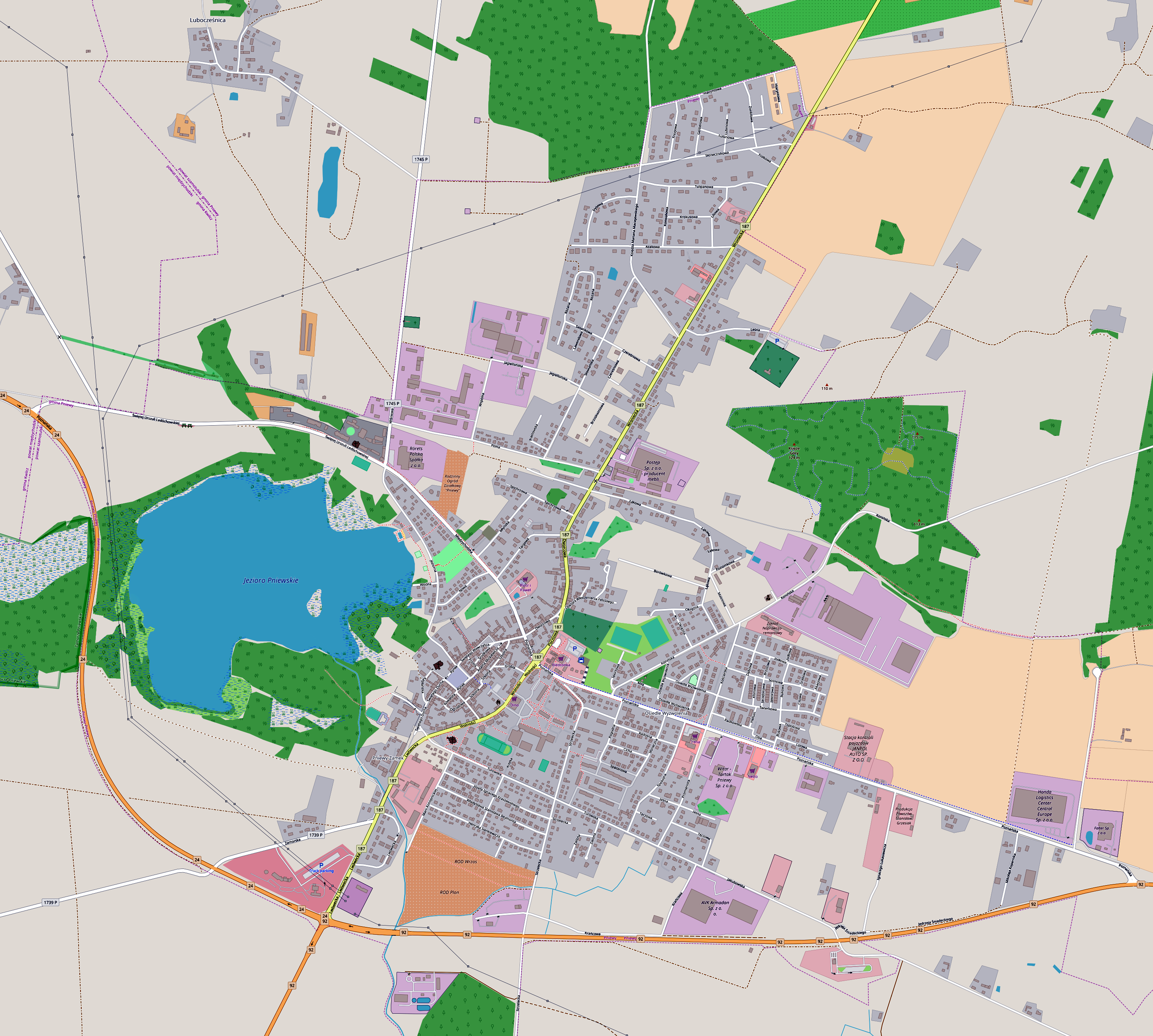 Plan miasta Pniewy.